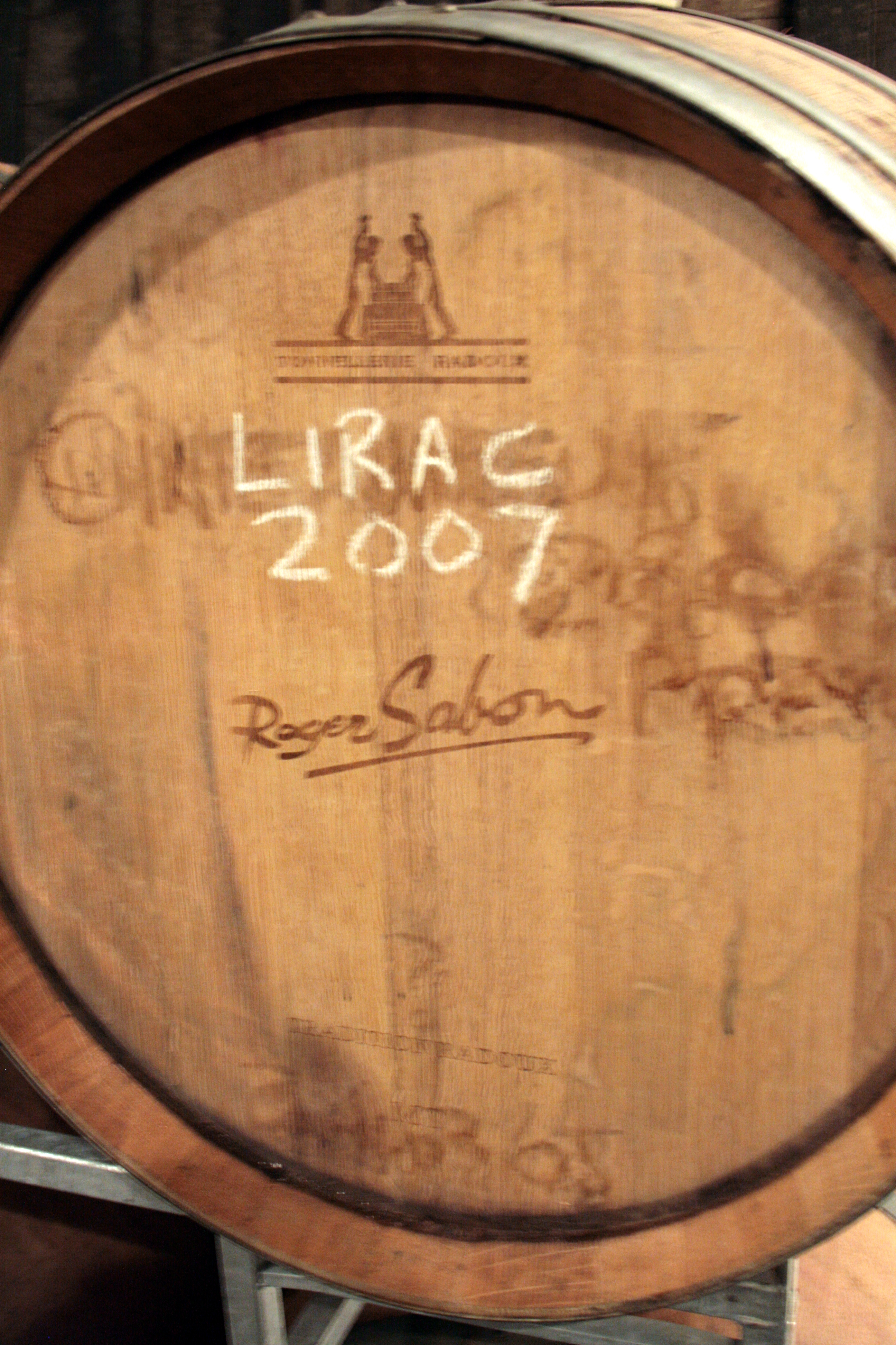 AOC Lirac millésime 2007